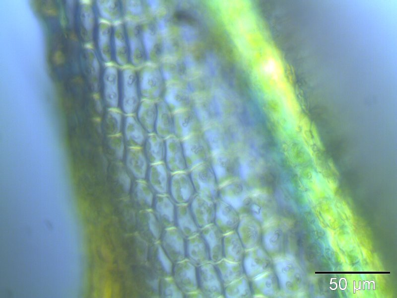 Gespitztes Glanzmoos (Phascum cuspidatum), Laminazellen, Rostock